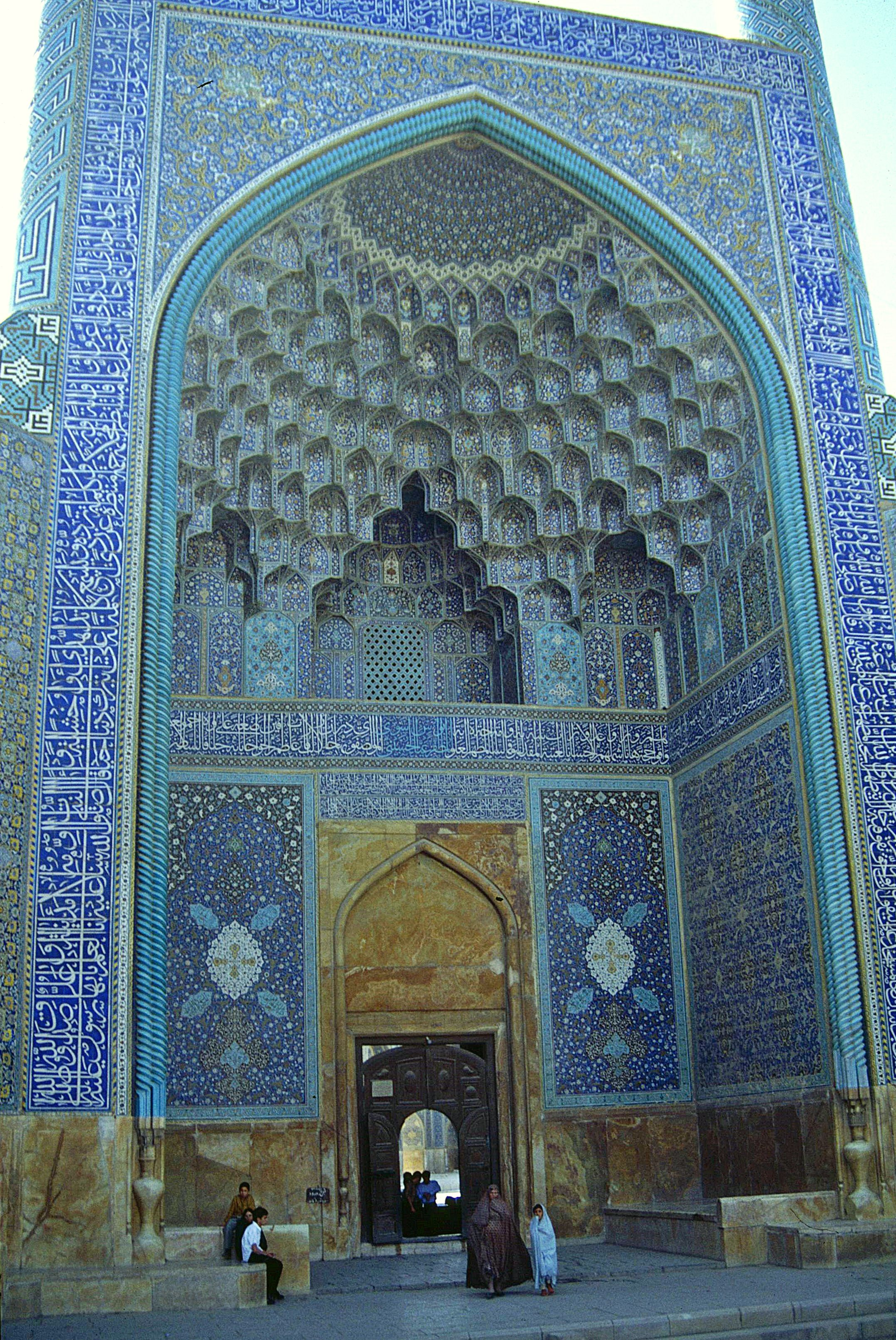 Masjed-e Shah, Isfahan: Eingang